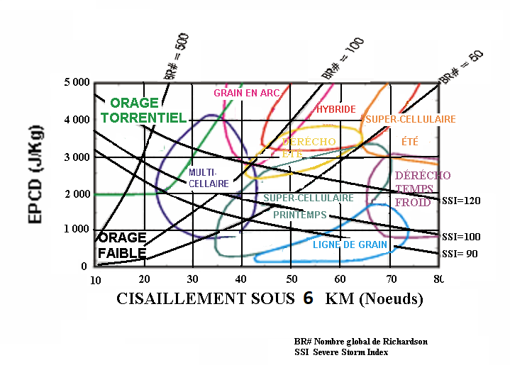 Diagramme montrant les zones où l'on retrouve les différents type d'orages violents selon l'énergie potentielle de la masse d'air (EPCD) et le cisaillement des vents sous 6 km d'altitude. On y voit également les courbes du nombre global de Richardson et celles d'un indice de temps violent (SSI) développé par Rasmussen au Storm Prediction Center du NWS.